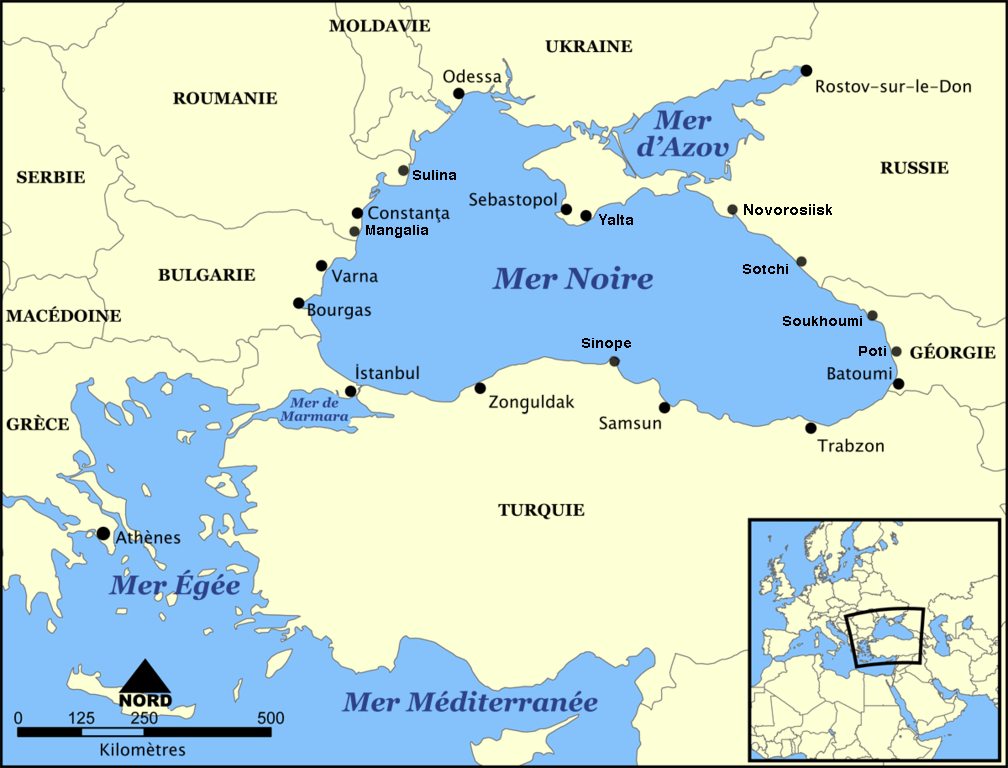 carte de la mer Noire et de la mer d'Azov et leurs principales villes côtières.